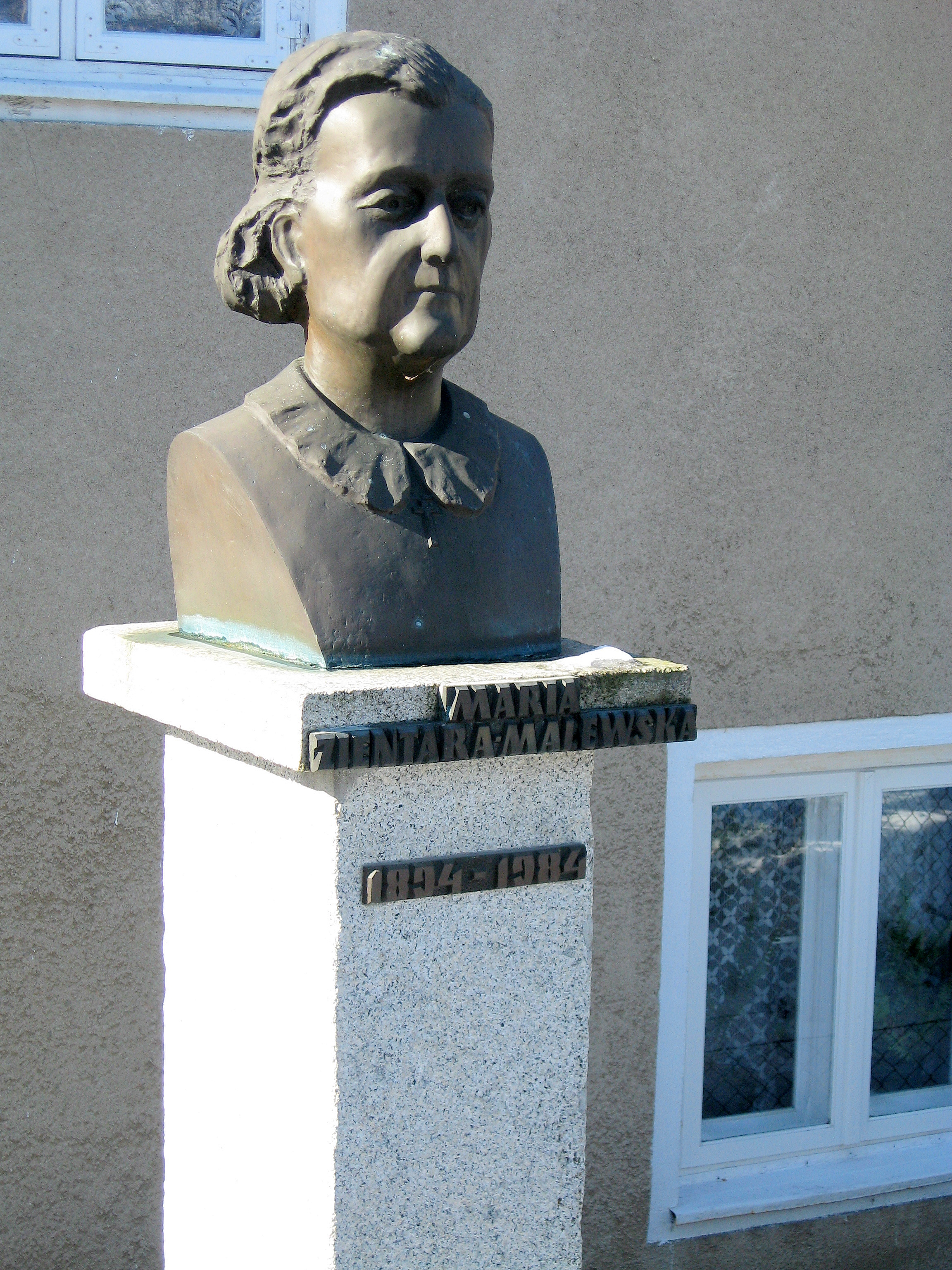 Pomnik Marii Zientary-Malewskiej w Brąswałdzie. Pomnik stoi przed domem, znajdującym się w miejscu nieistniejącego już budynku, w którym w 1894 urodziła się poetka.